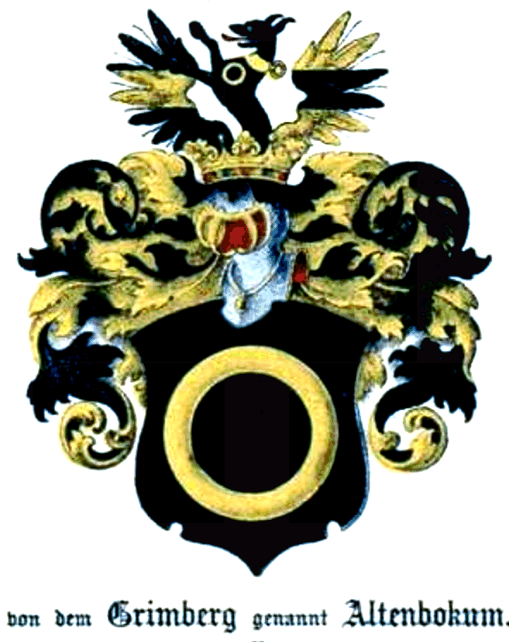 Wappen derer von dem Grimberg genannt Altenbokum